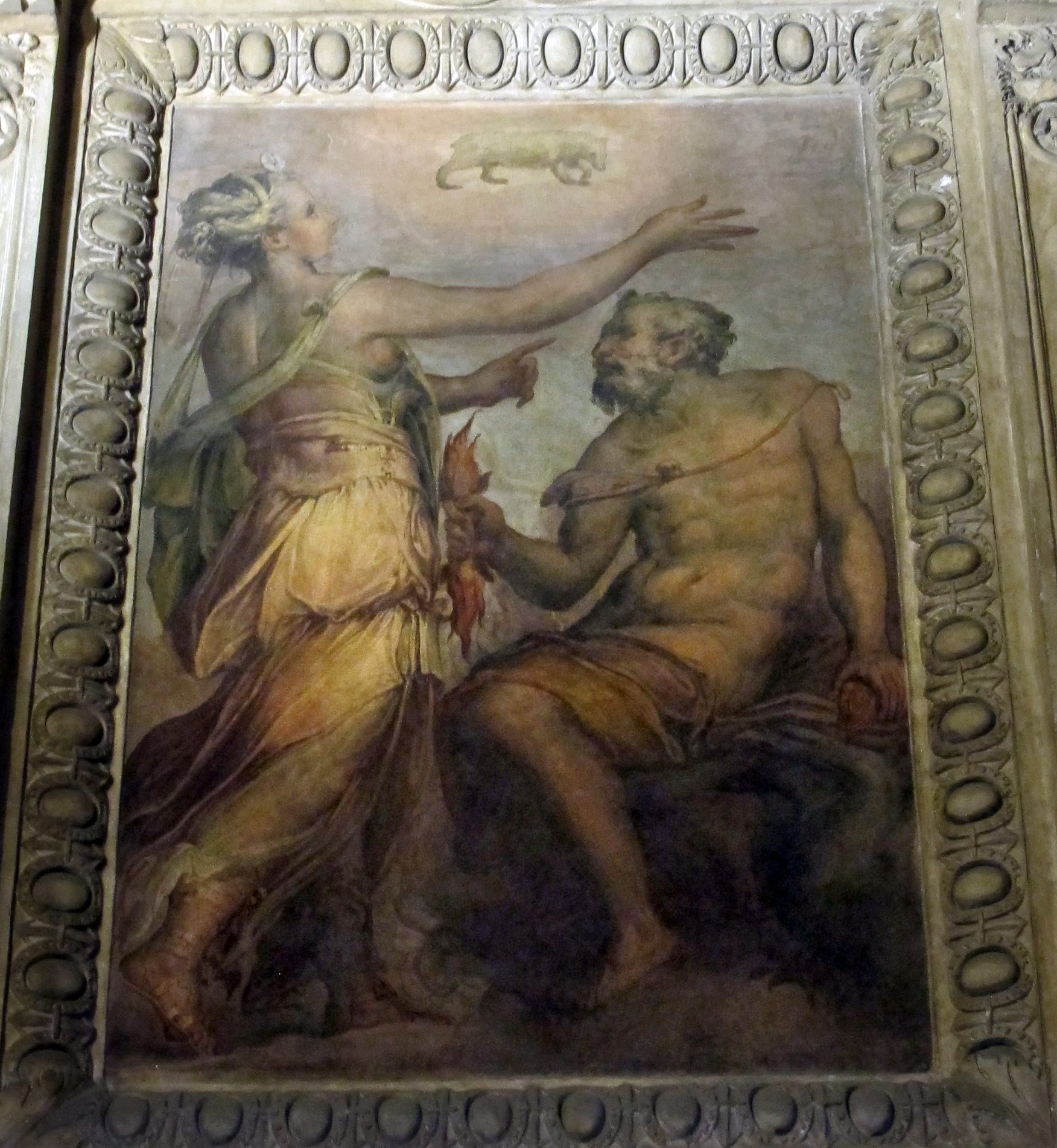 Palazzo Vecchio, Firenze